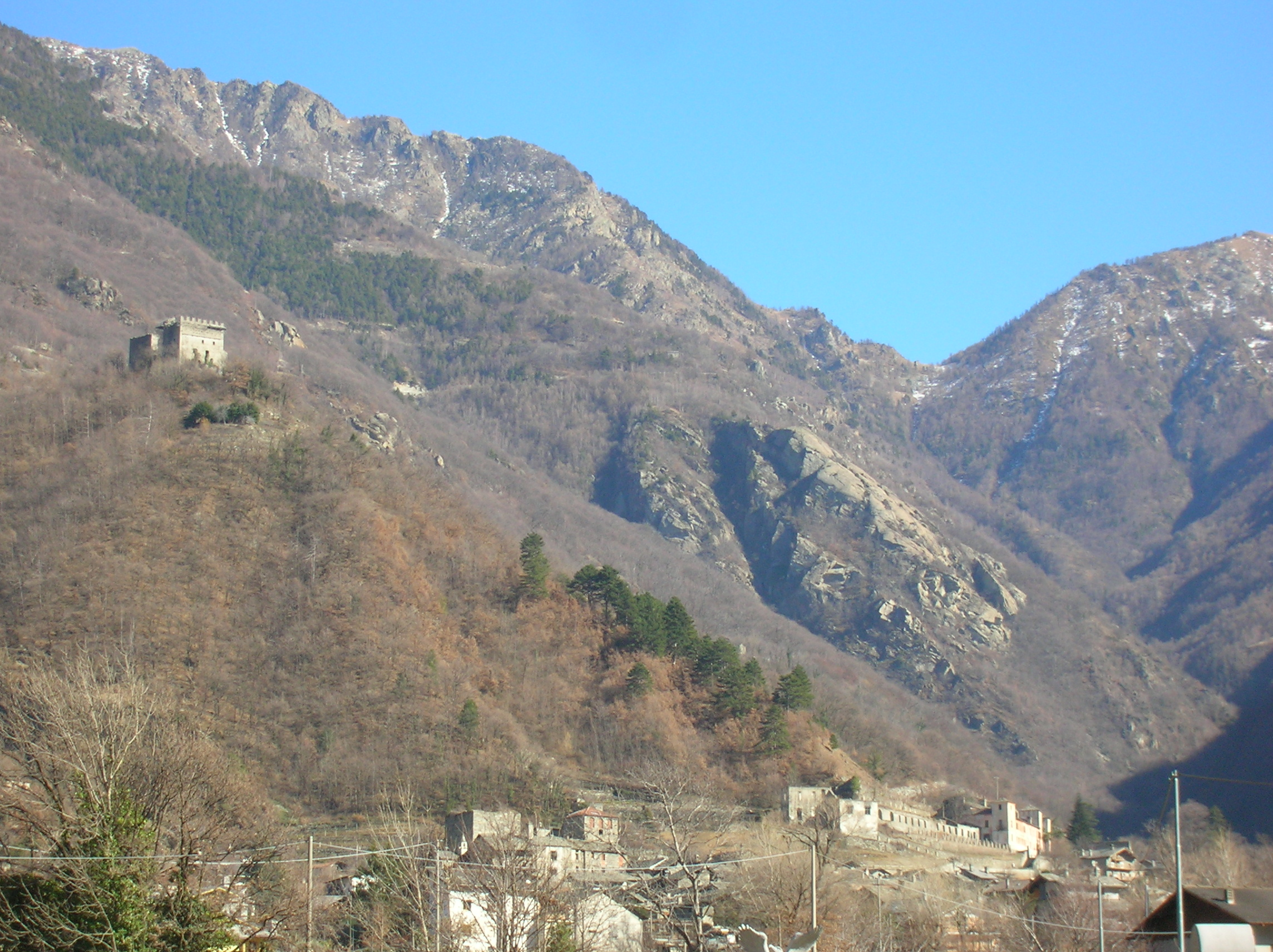 Castello superiore di Arnad (in alto a sinistra) castello della Costa (in basso al centro) e Castello inferiore (in basso a destra) ad Arnad, Valle d'Aosta, Italia.